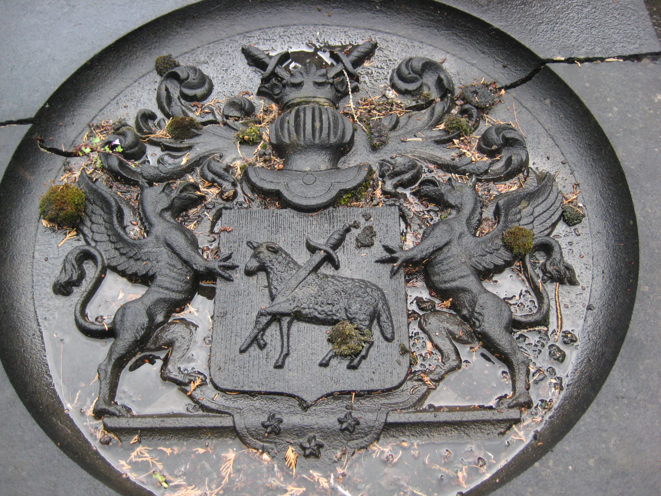 Detail van het grafmonument en familiegraf voor de familie Lamsweerde